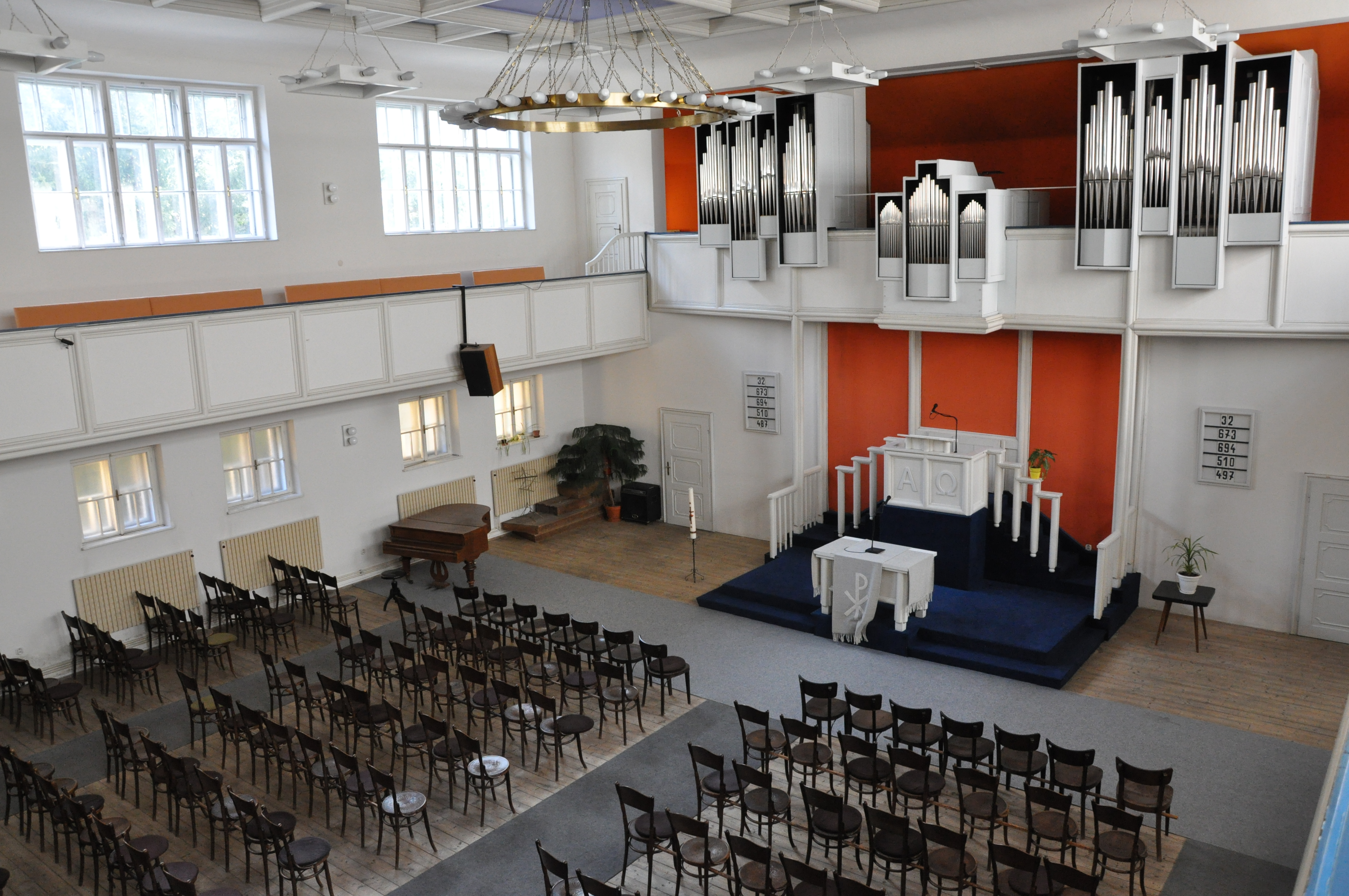 Blahoslavův dům, sál evangelického sboru Brno II.